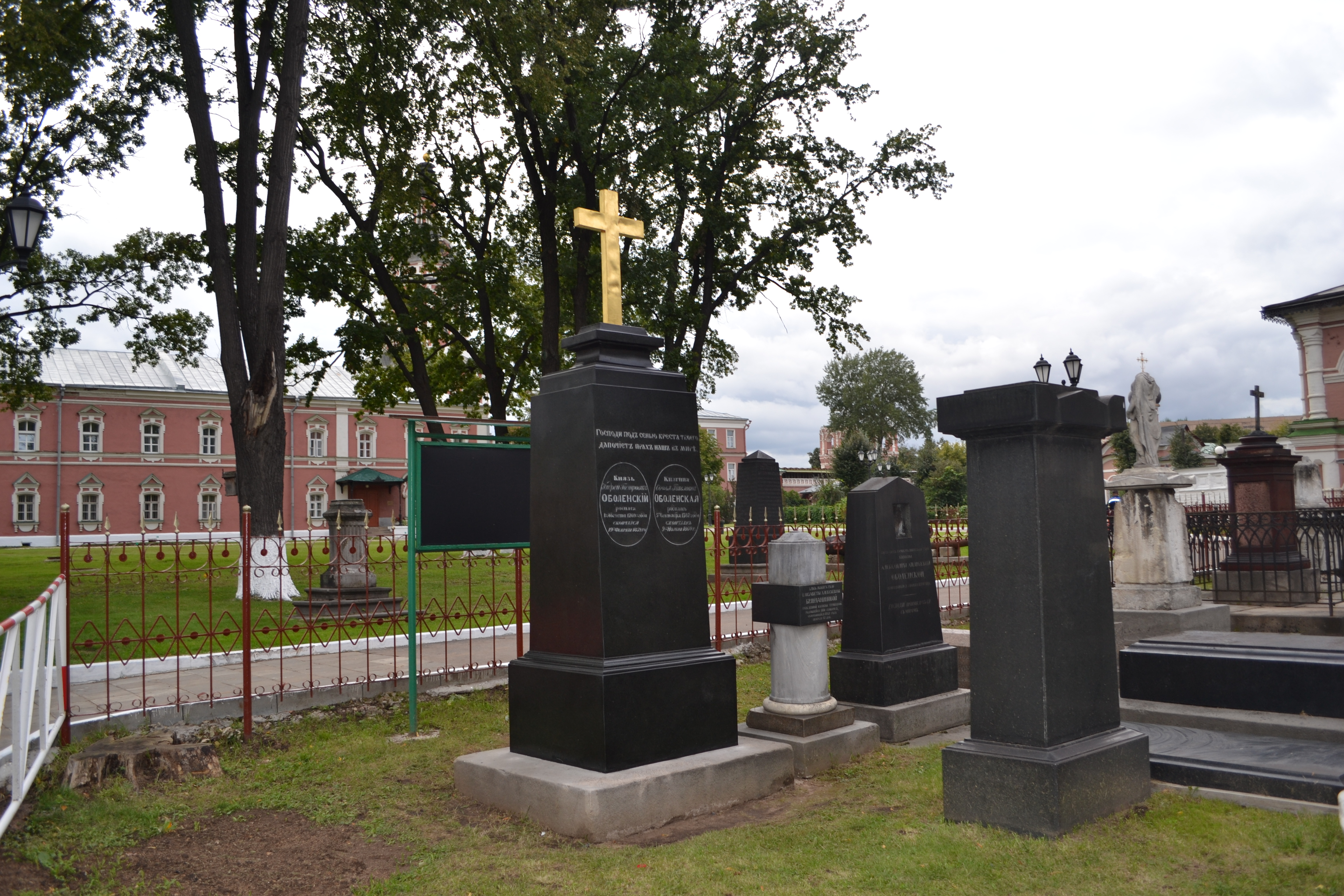 могилы в некрополе Донского монастыря